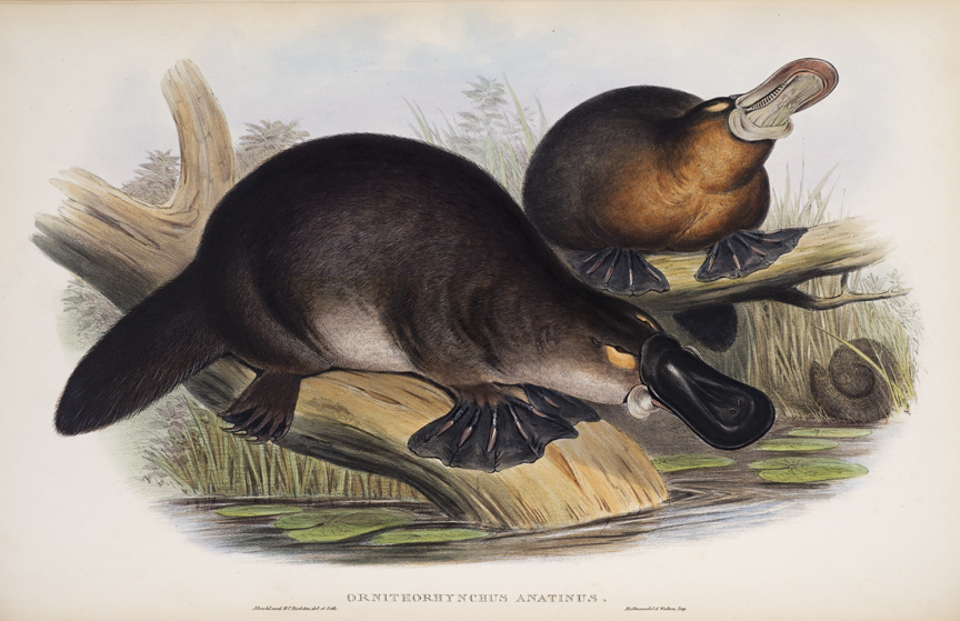 Schnabeltier2